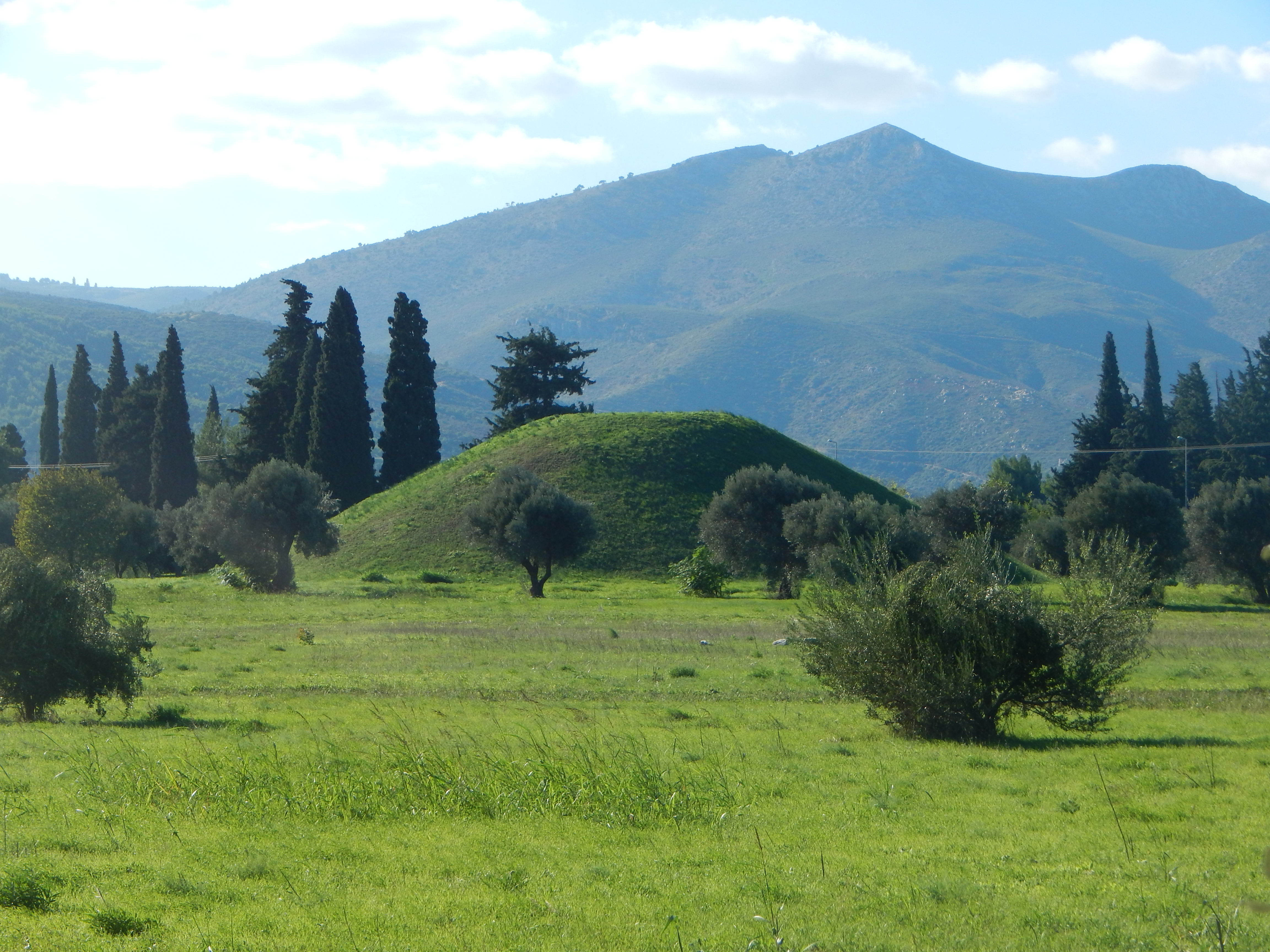 Τύμβος Αθηναίων στο Μαραθώνα«Τύμβος Αθηναίων στο Μαραθώνα»